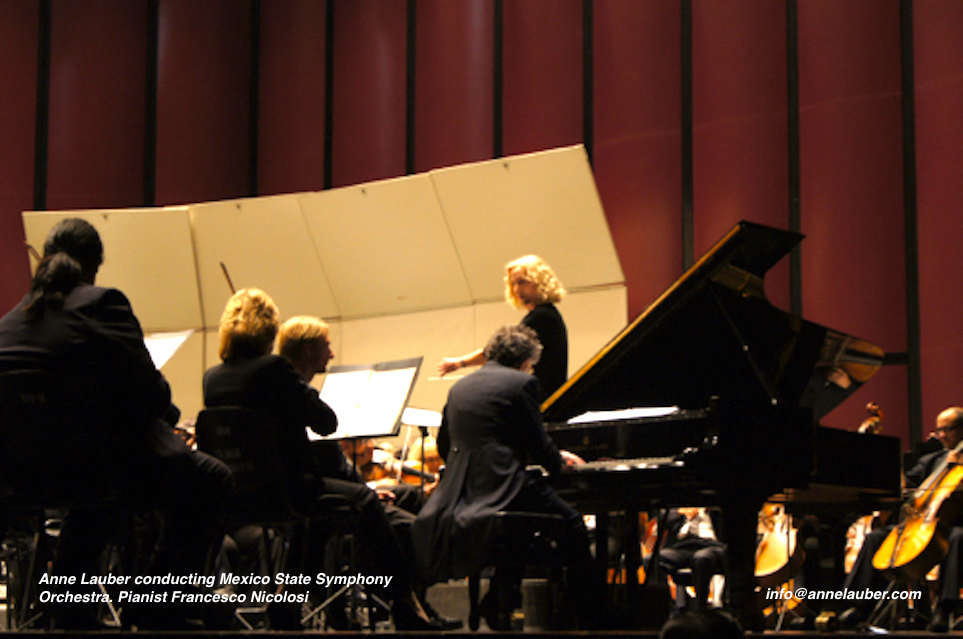 Anne Lauber à la direction de l'orchestre symphonique national du Mexique. Au piano : Francesco Nicolosi.